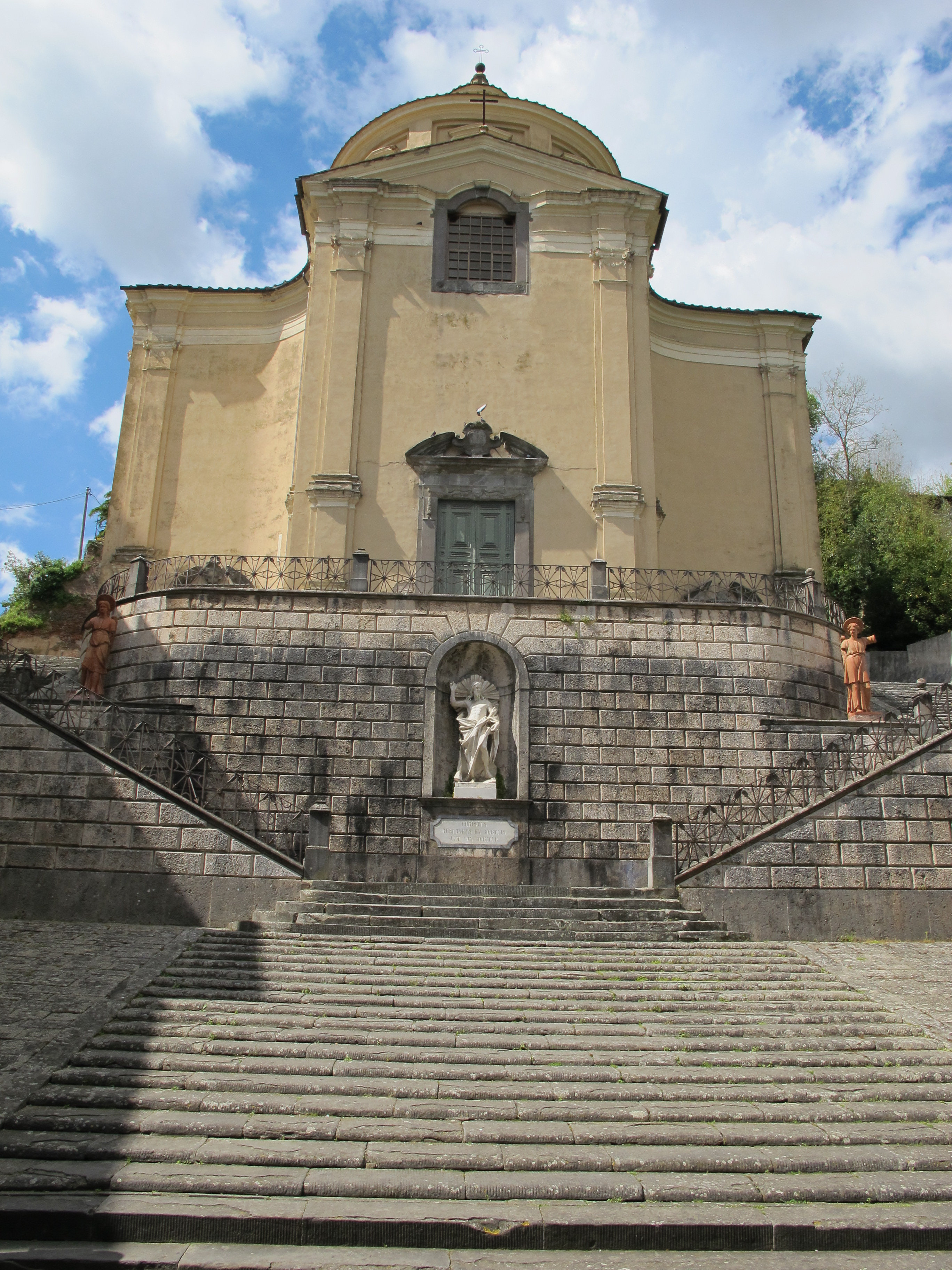 San minianto. ss. crocifisso, ext.